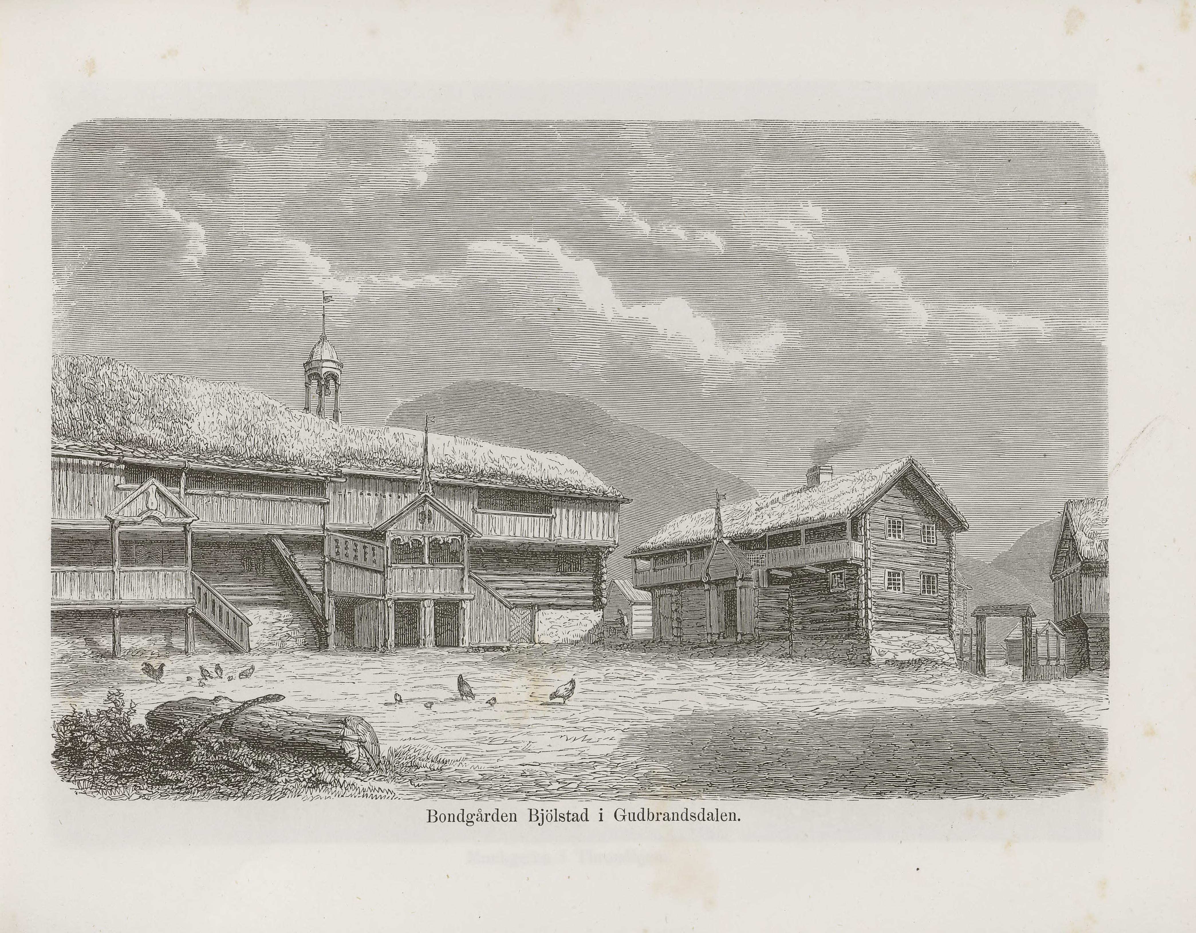 Illustrasjon hentet fra boken Nordiska taflor av ukjent forfatter og utgitt av Albert Bonnier (se, 1867)